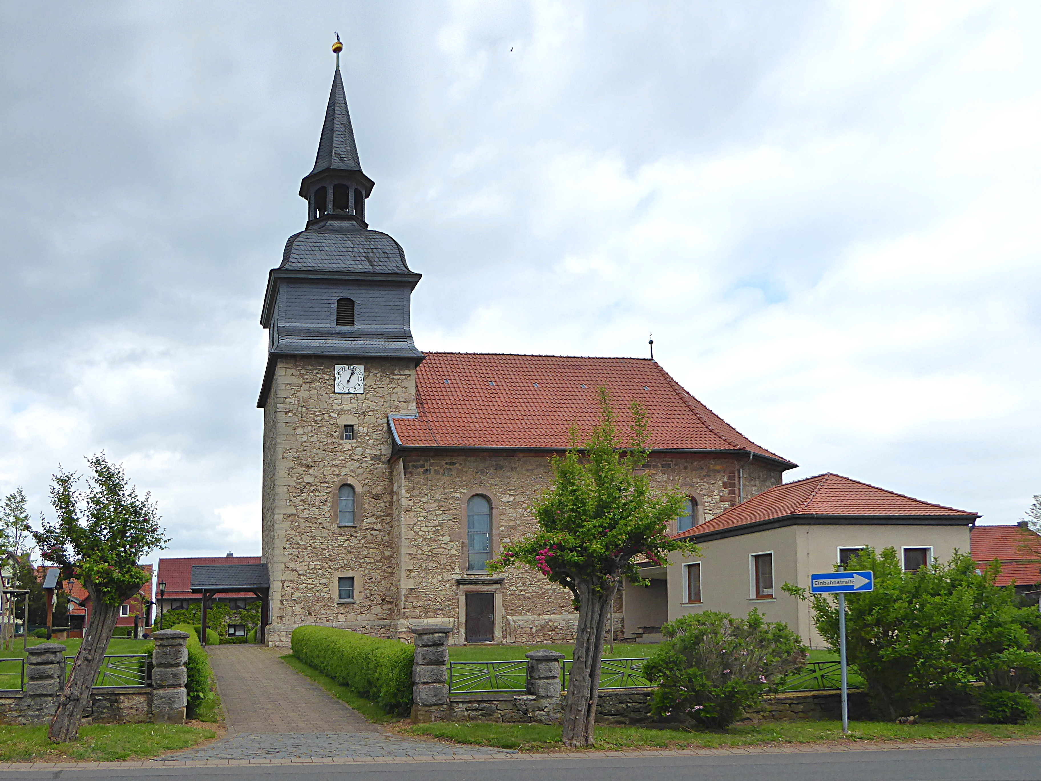 Kirche St. Simon und Judas in Neustadt (Eichsfeld) von Süden